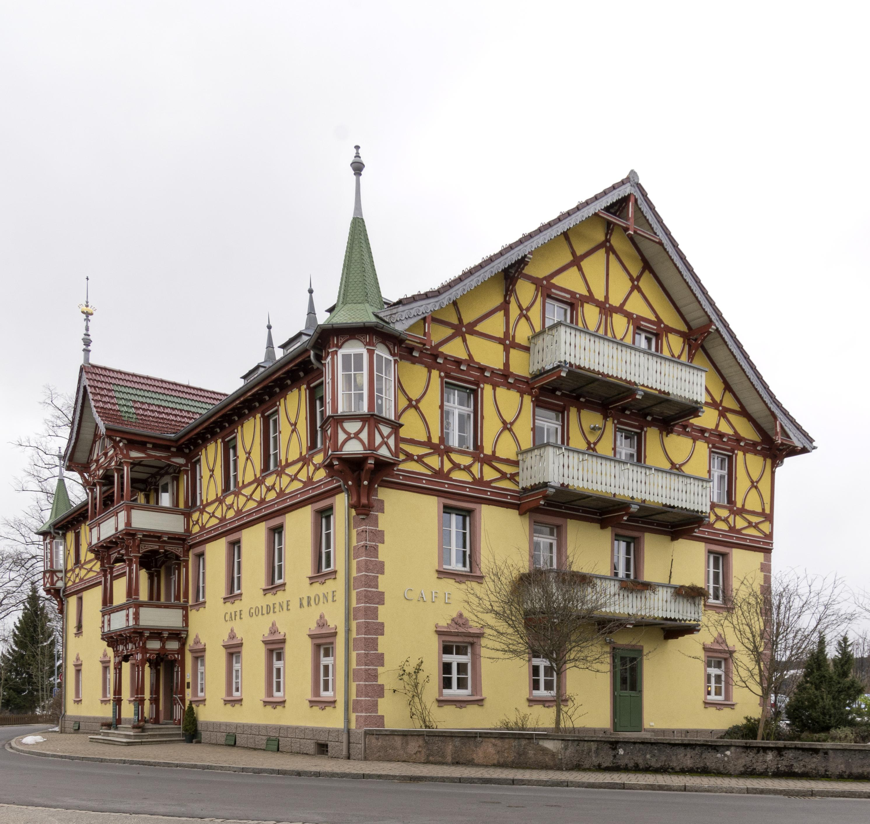 Bilder aus St. Märgen Im Neuen Haus das vom Abt Peter Glunk 1757 gebaut wurde lebte Matthias Faller 20 Jahre